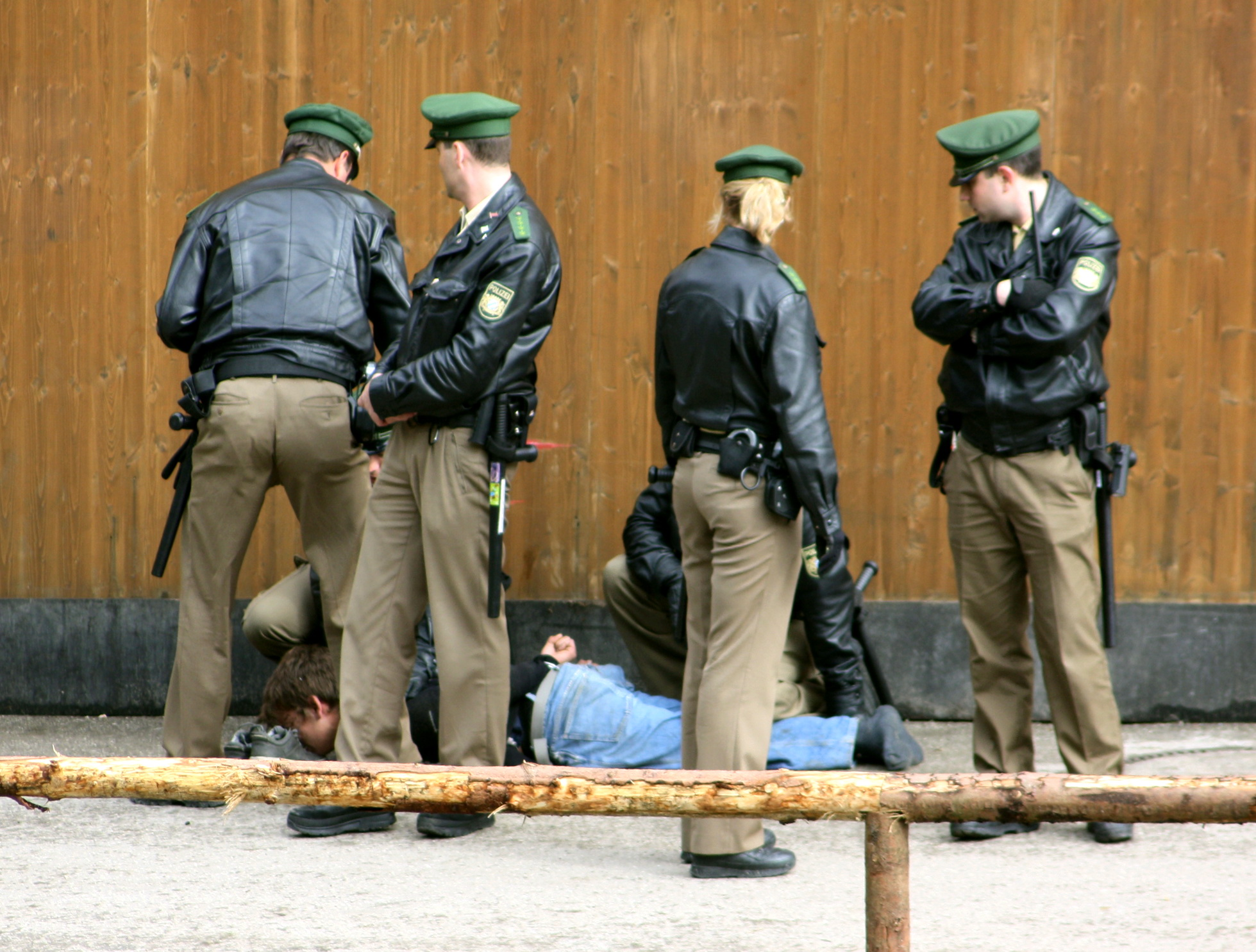 Festnahme eines betrunkenen Randalierers auf dem Oktoberfest.